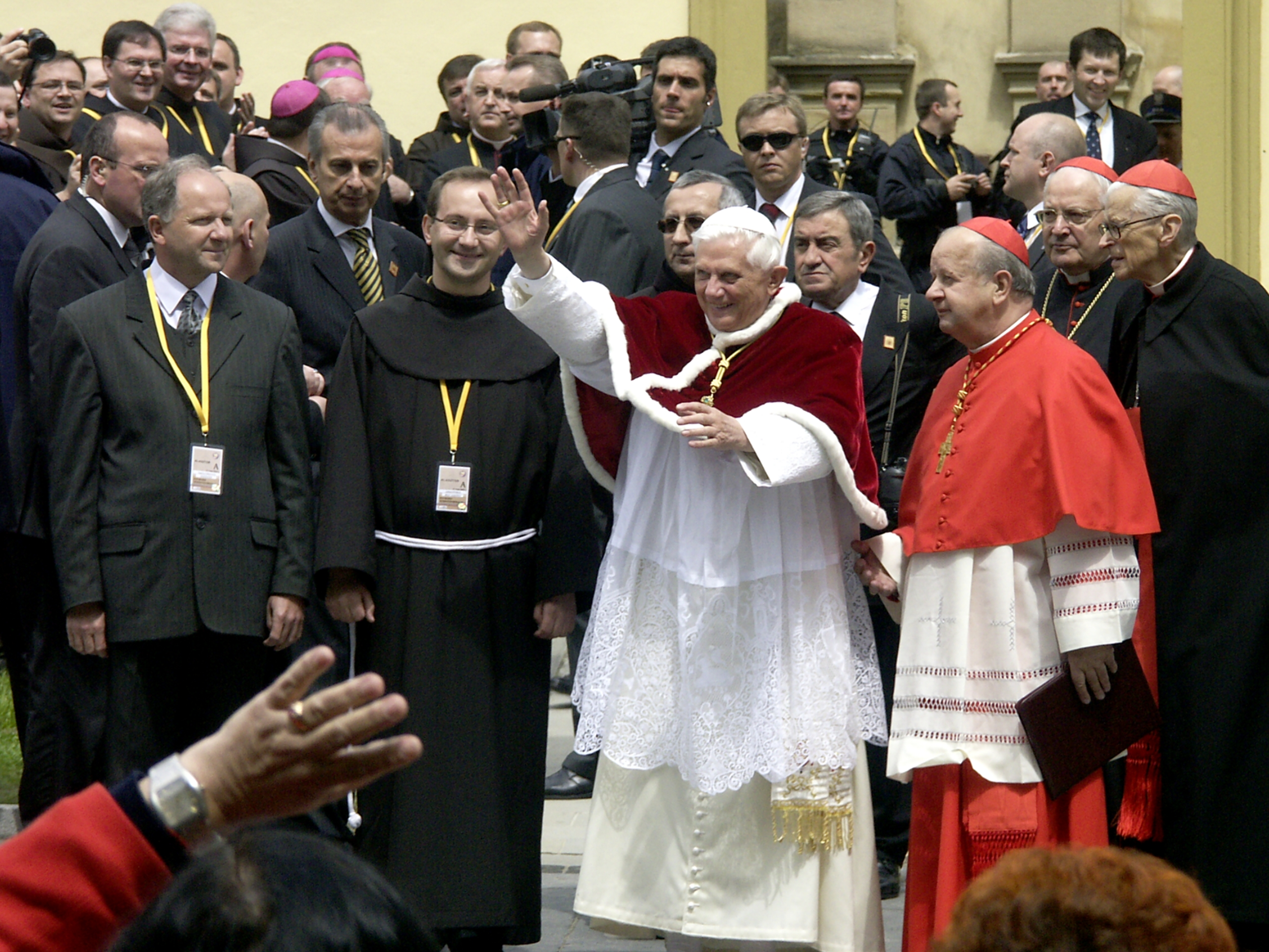 Wizyta Papieża Benedykta XVI w Kalwarii Zebrzydowskiej - 27 maja 2006 - foto. Jacek Pasternak